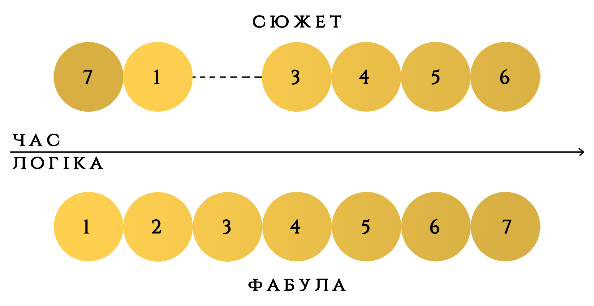 Схема сюжету та фабули